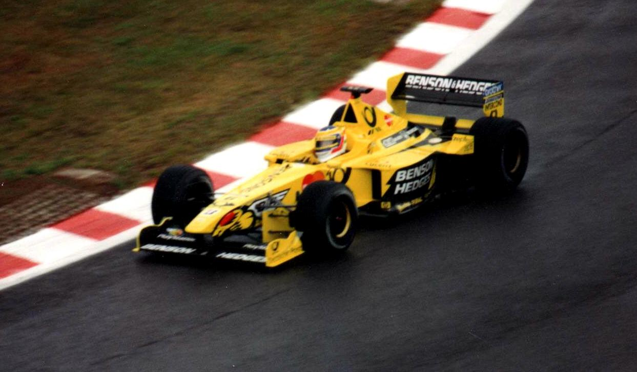 Jarno Trulli (Jordan) at the 2000 Belgian Grand Prix